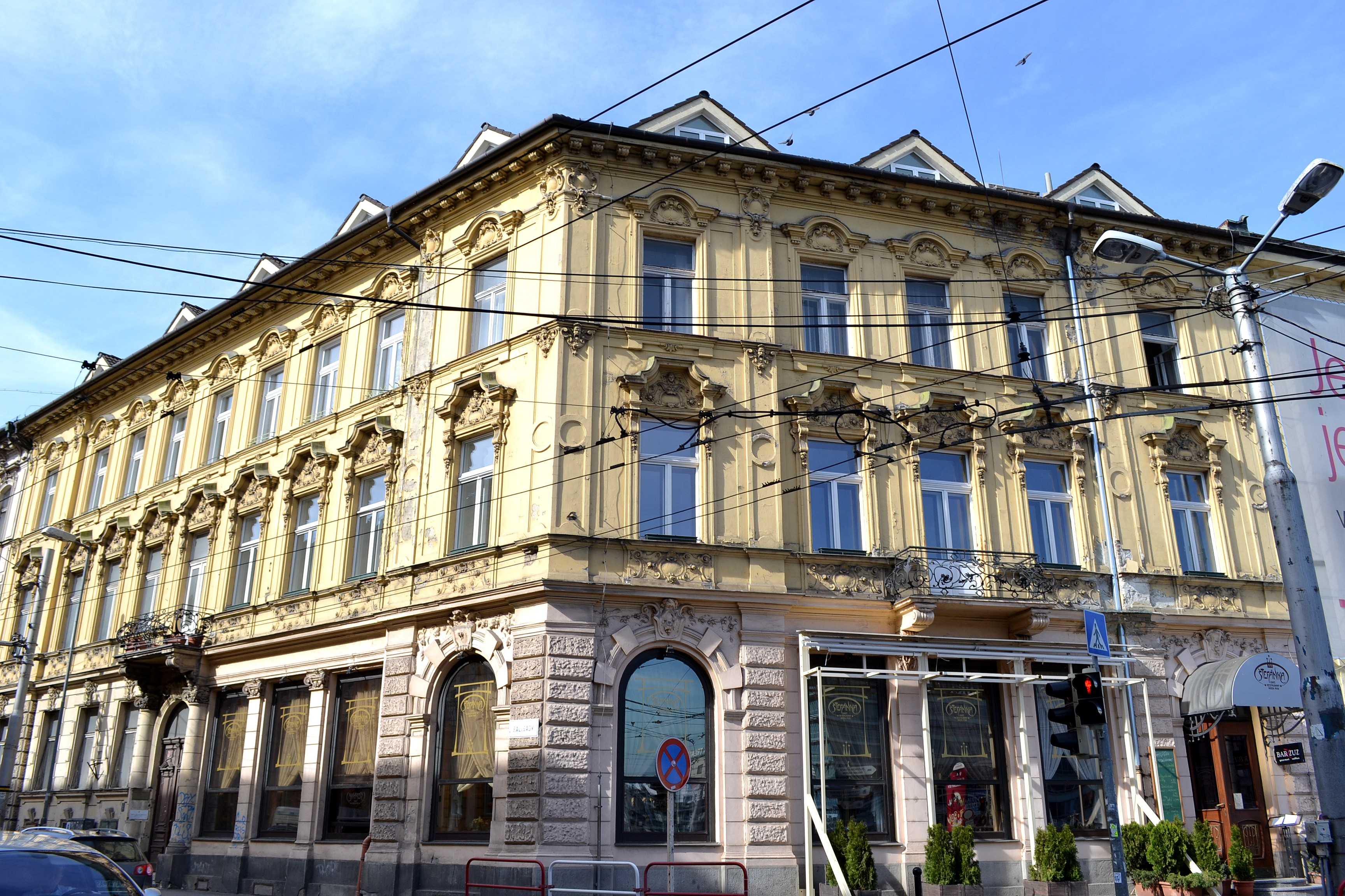 Palisády č. 59. Celkový pohľad na budovu. V nárožnej budove na rohu Palisád a Štefánikovej ul. sídli známa bratislavská kaviareň Štefánka